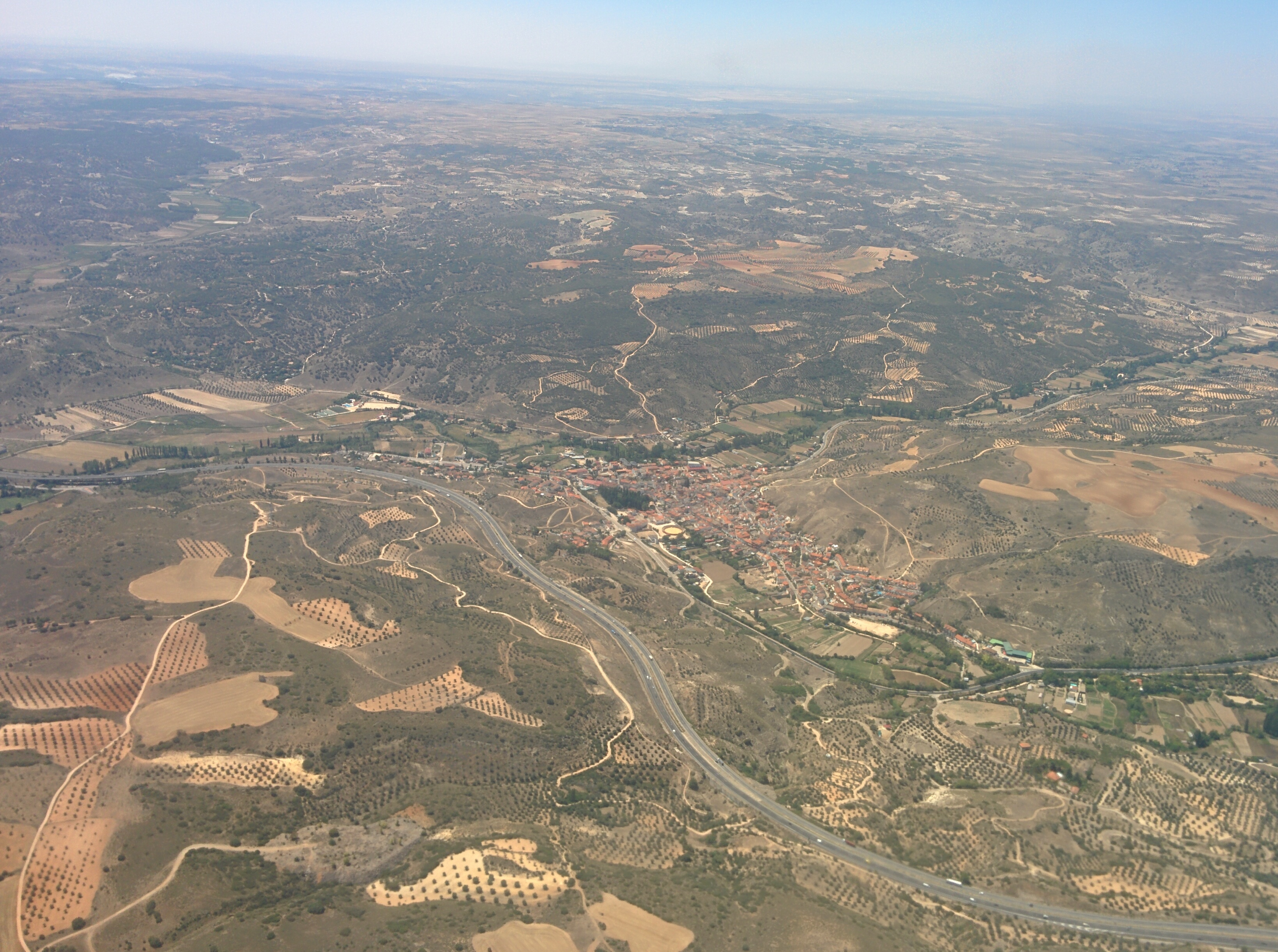 Vista aérea de Perales de Tajuña, en Madrid (España).